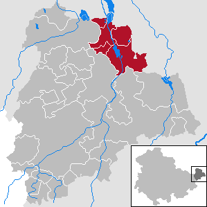 Verwaltungsgemeinschaft Pleißenaue in Thuringia - District Altenburger Land